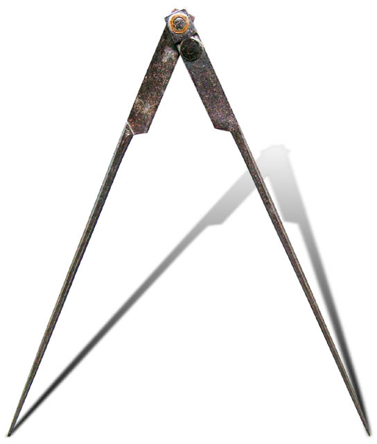 Compas à deux pointes en fer forgé. XVIIIe siècle. Contents 1 Source 2 Licensing 3 Licensing 4 Original upload log Source Photo et montage : Roby ✉ Licensing GFDL Version imprimable sur demande à Roby ✉ Roby